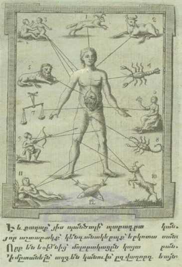 Страница из трактата "О движении небес" Ованеса Ерзнкаци Плуза. Издание 1792 года.